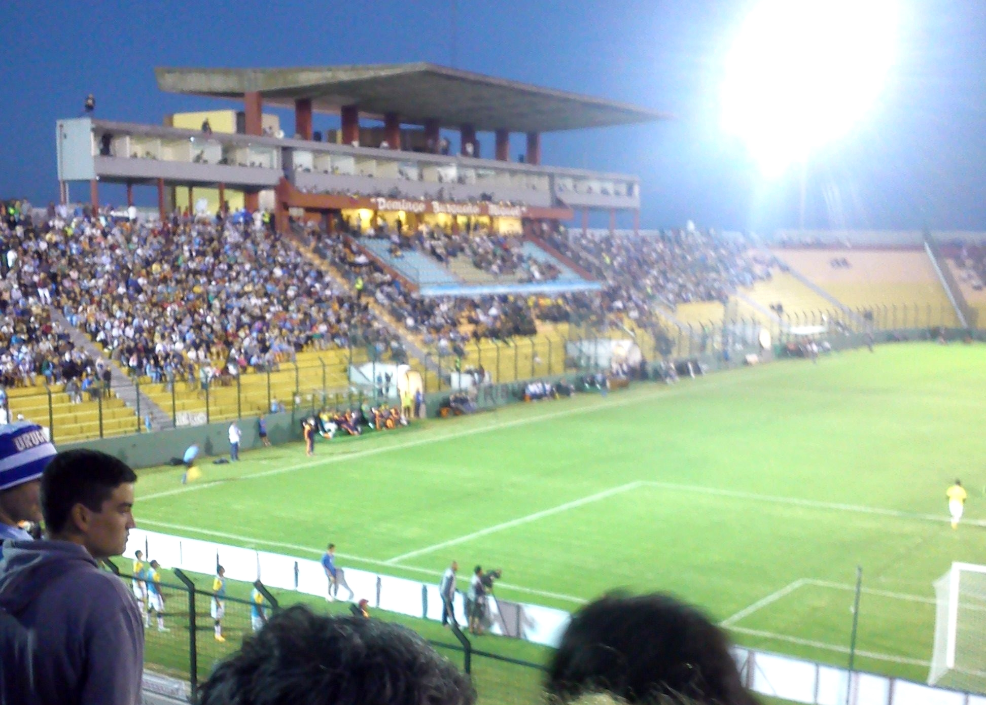 Partido entre la selección de Colombia y Venezuela durante la Sudamericano Sub-20 de 2015, disputado en el Estadio Domingo Burgueño Miguel.